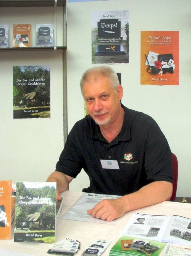 Der deutsche Autor Bernd Beyer am Stand vom Haileiht-Verlag und von Hai-tec Autorenservice vor Plakaten mit seinen Büchern auf der mitteldeutschen Buchmesse 2016